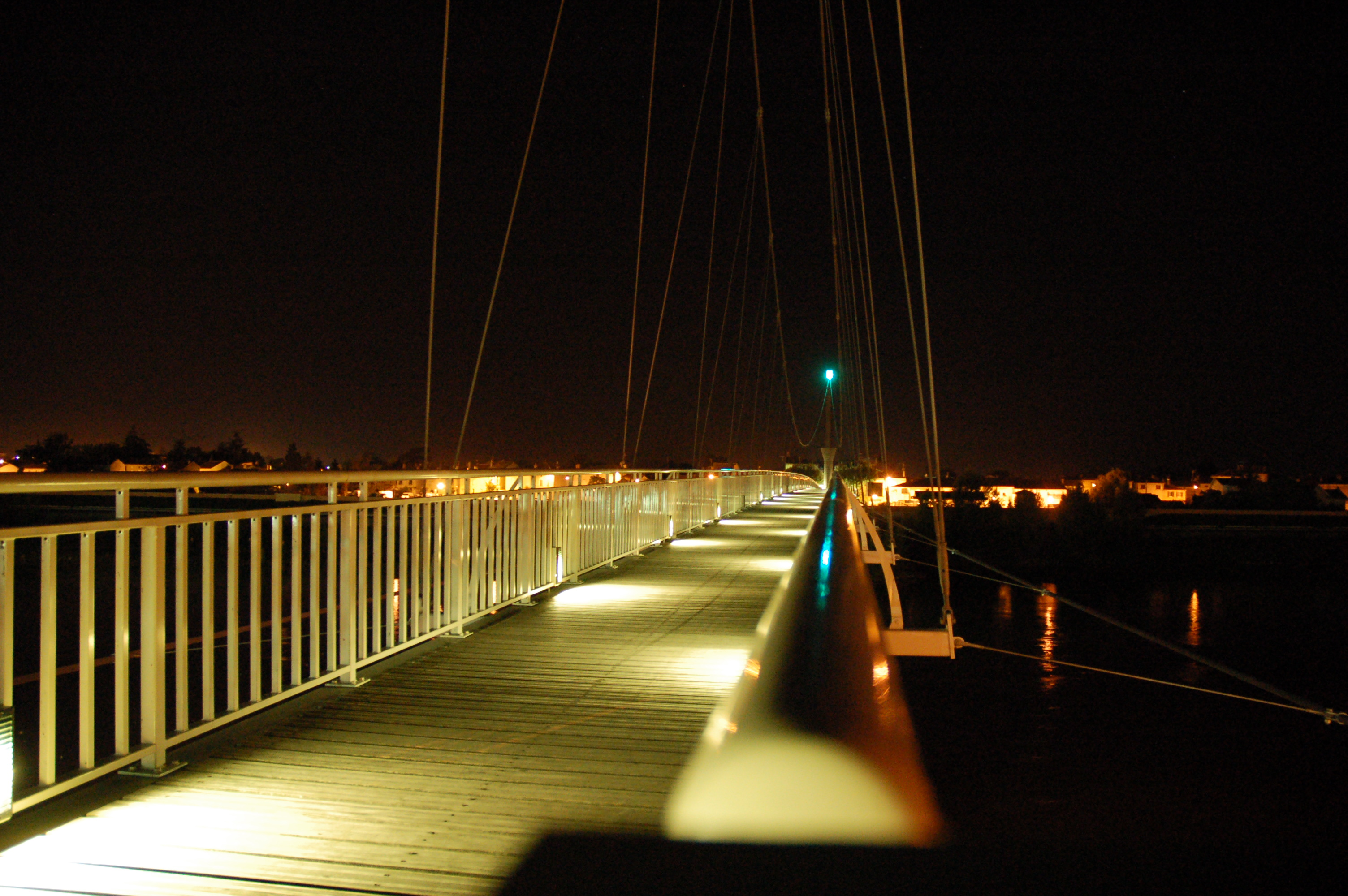 Le passage piéton sur la Garonne à Agen